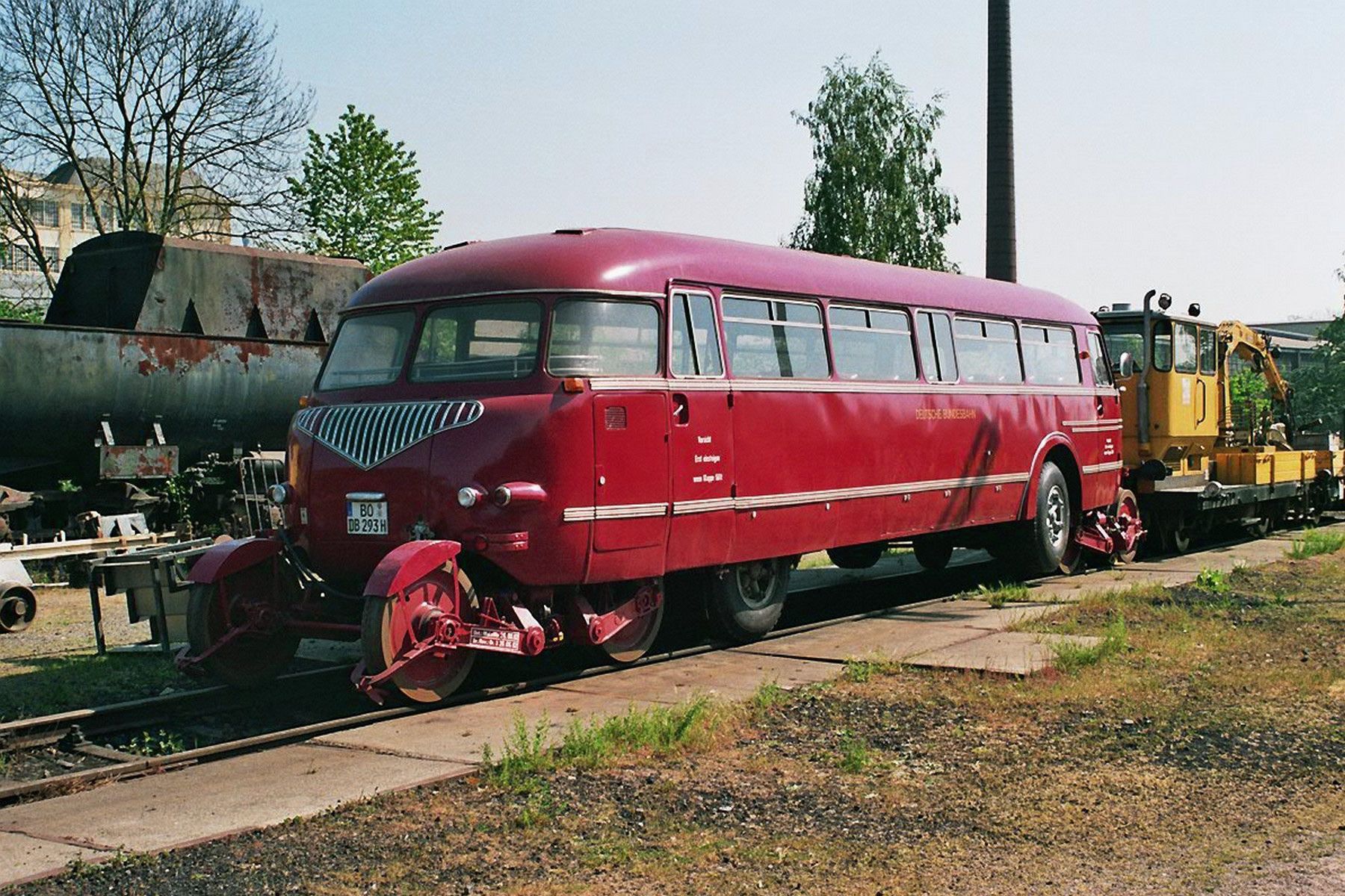 Schienen Straßen Bus in Bochum Dahlhausen beim 30 jährigen Jubiläum.